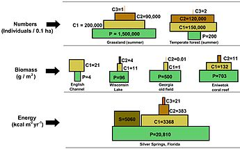 food web